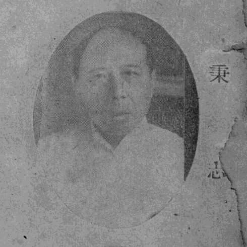 《民國名人圖鑑》肖像